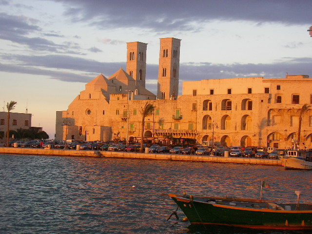 Immagine raffigurante il porto di Molfetta